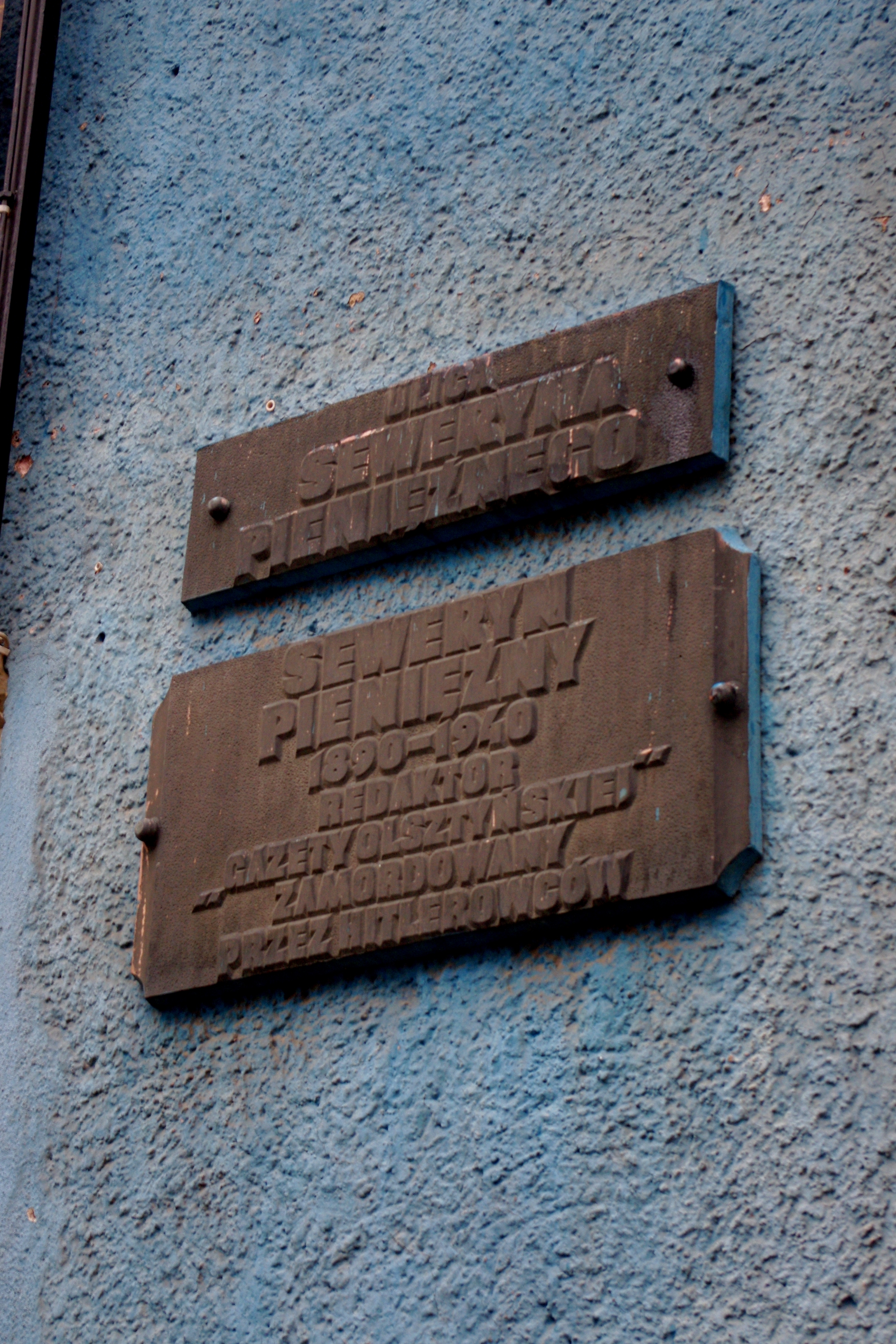 Tablica upamiętniająca działacza społecznego i oświatowego na Warmii - Seweryna Pieniężnego na ulicy jego imienia w Olsztynie